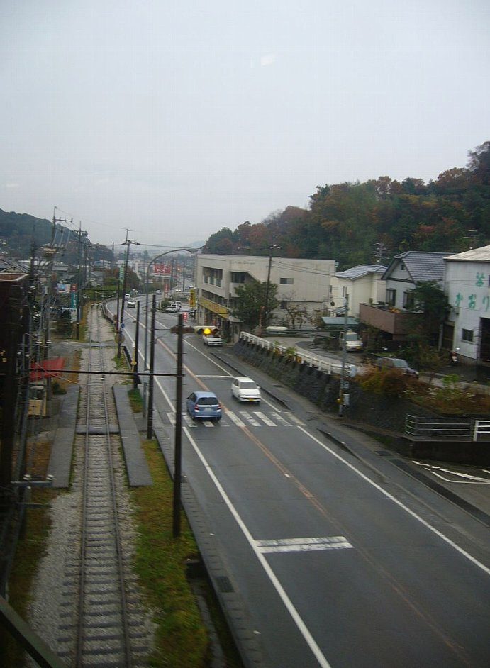 咥内停留場 西側で交差する土讃線から東望